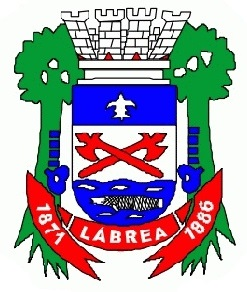 b Brasão do município de Lábrea